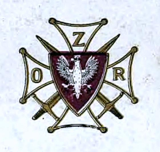 Odznaka Związku Oficerów Rezerwy Rzeczypospolitej Polskiej.